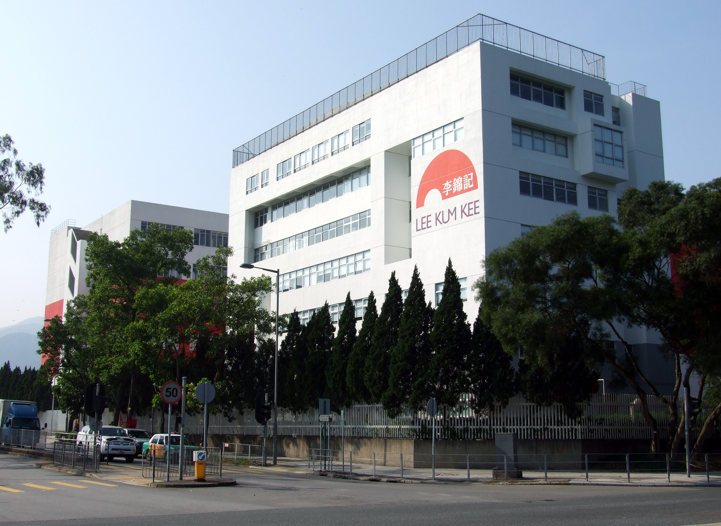 中文（香港）: 大埔工業園李錦記